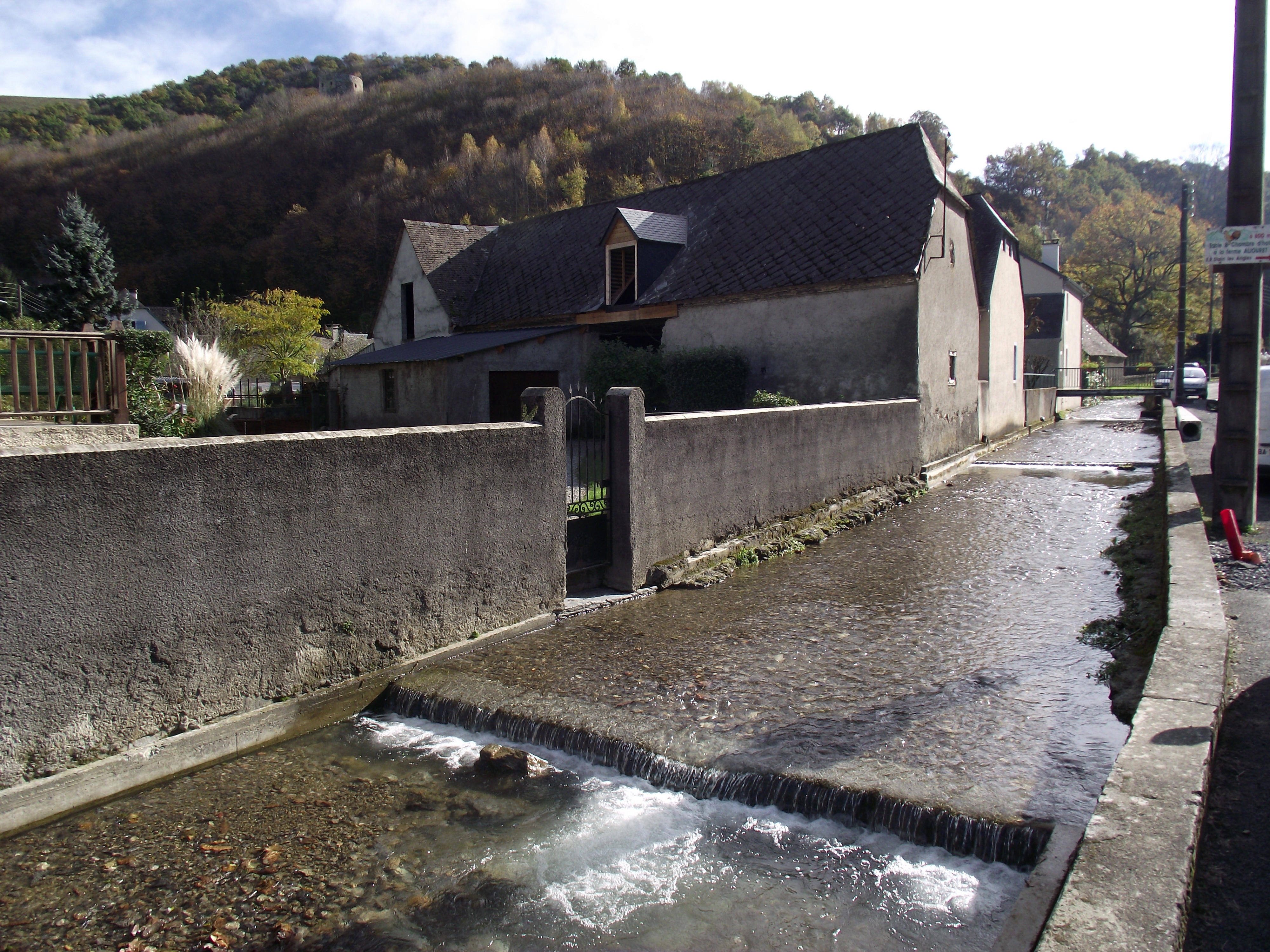 L'Échez aux Angles (Hautes-Pyrénées, France)